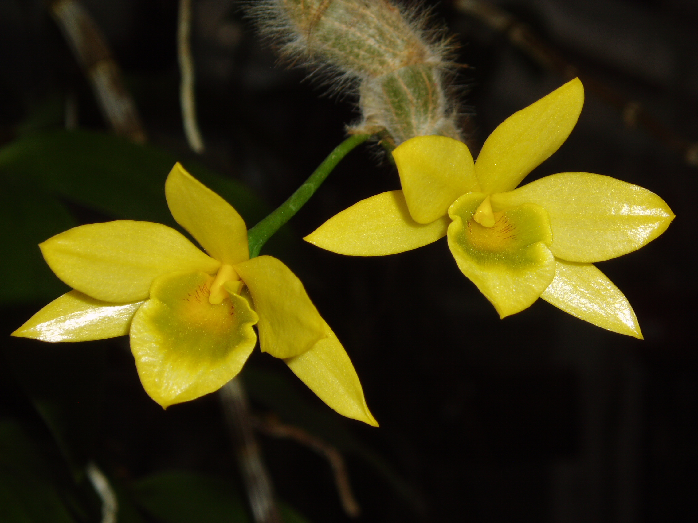 Dendrobium senile, Gothenburg Botanical Garden